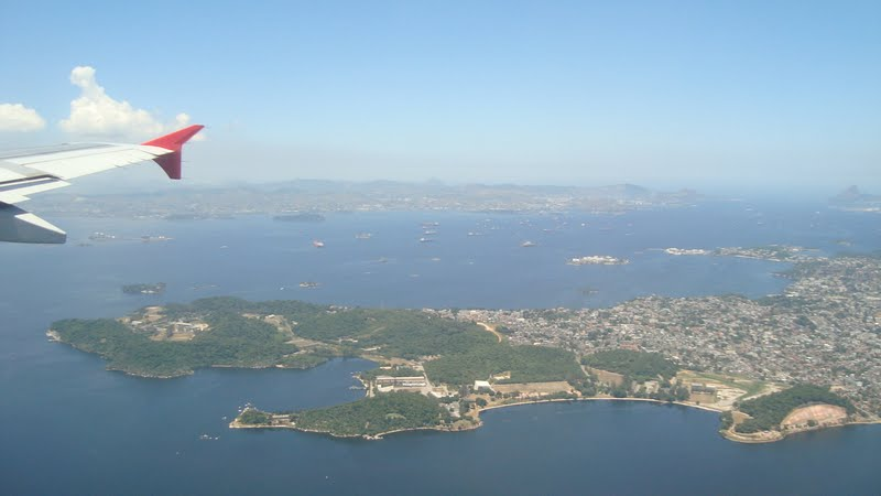 Vista da Baía de Guanabara através de um avião.